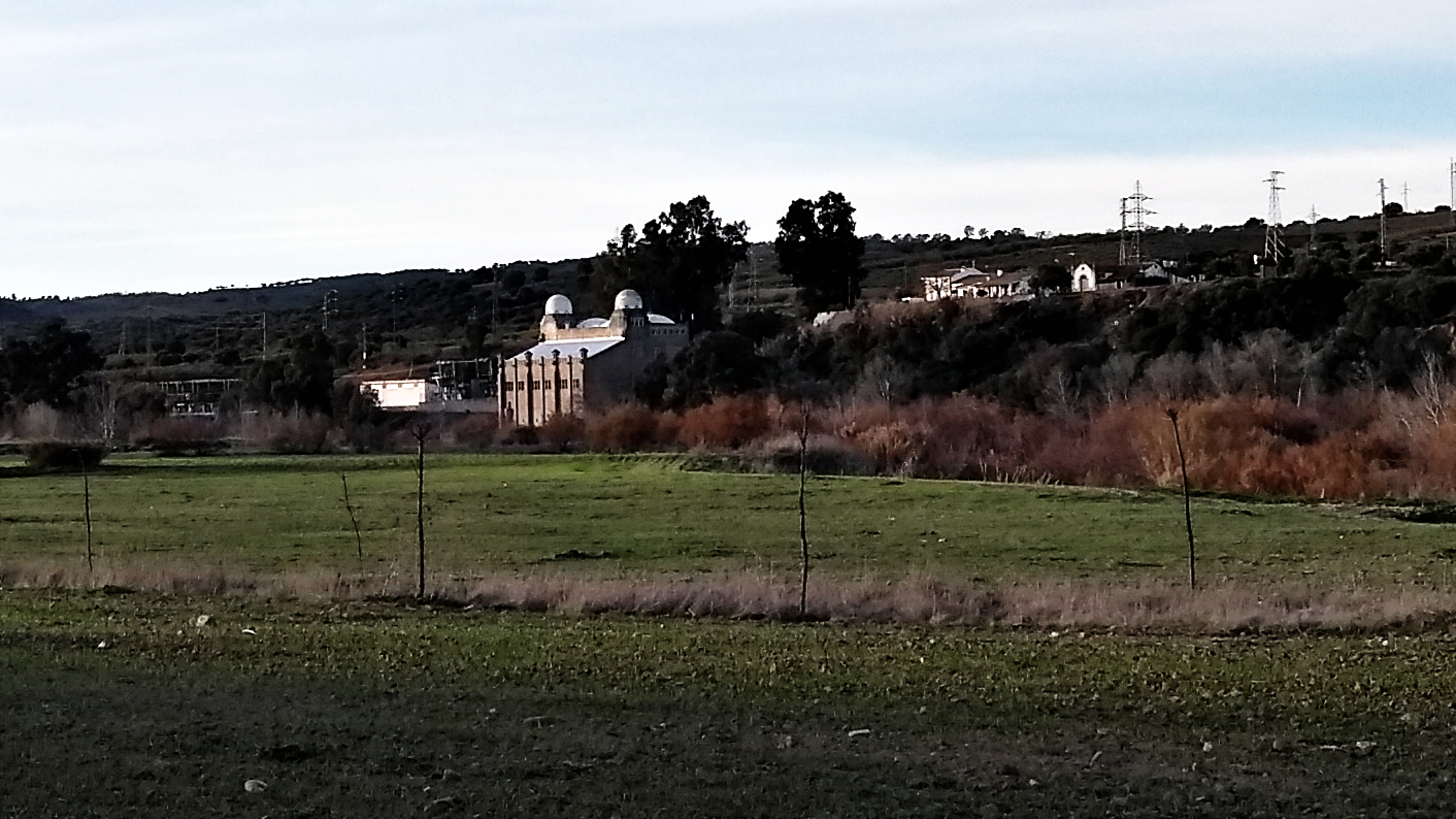 Conjunto de la Presa de El Salto